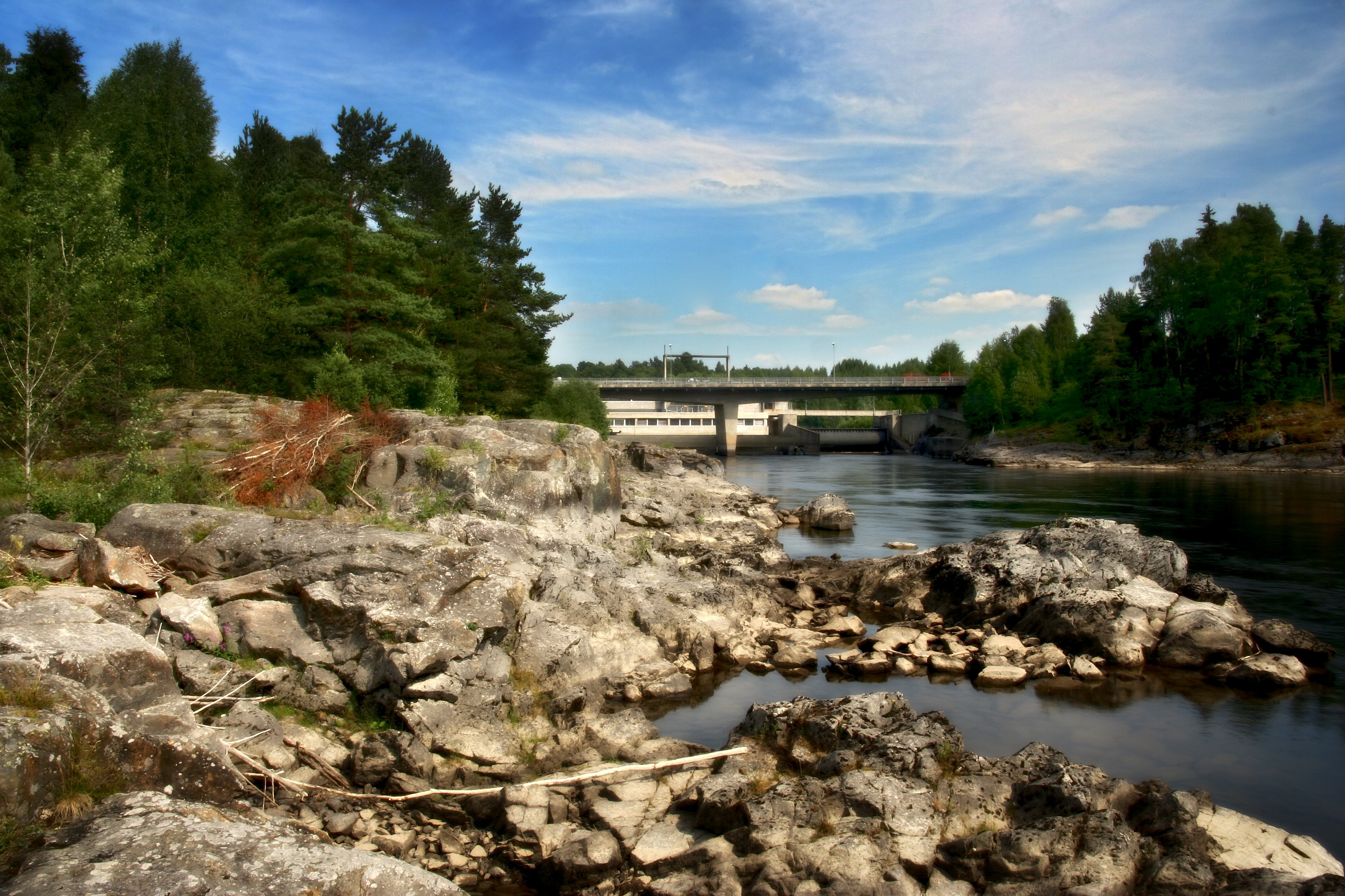 Bingsfossen vannkraftverk Bilde tatt av Marcus Ramberg